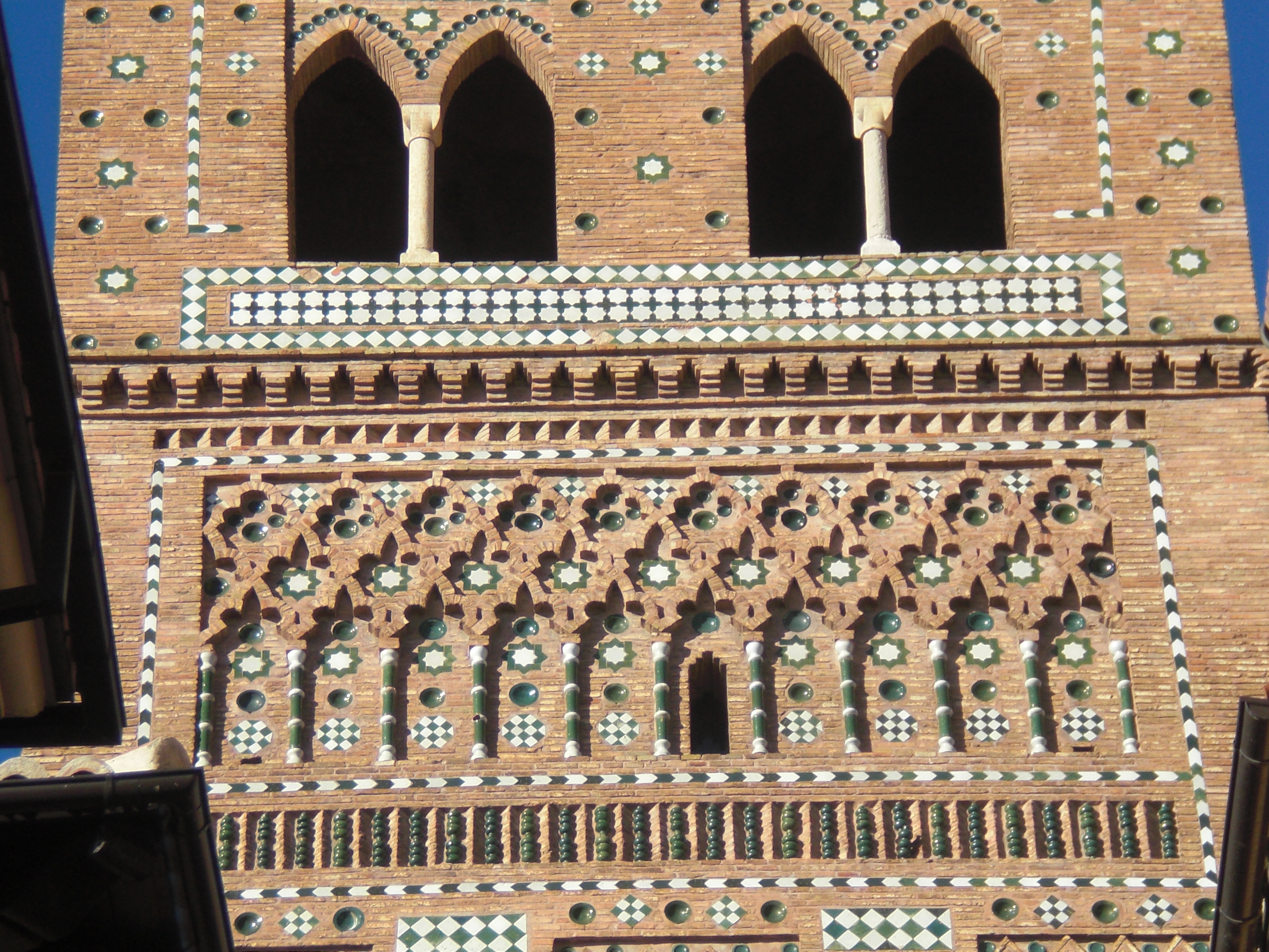 Mudehxaro en la Turo de la Savinto